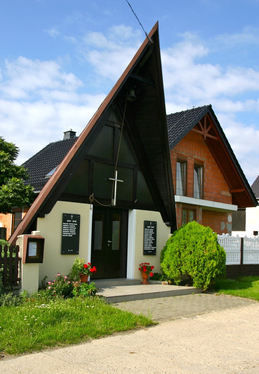 Nowy Bud (dodatkowa nazwa w j. niem. Neubude) – przysiółek w Polsce położony w województwie opolskim, w powiecie krapkowickim, w gminie Strzeleczki.